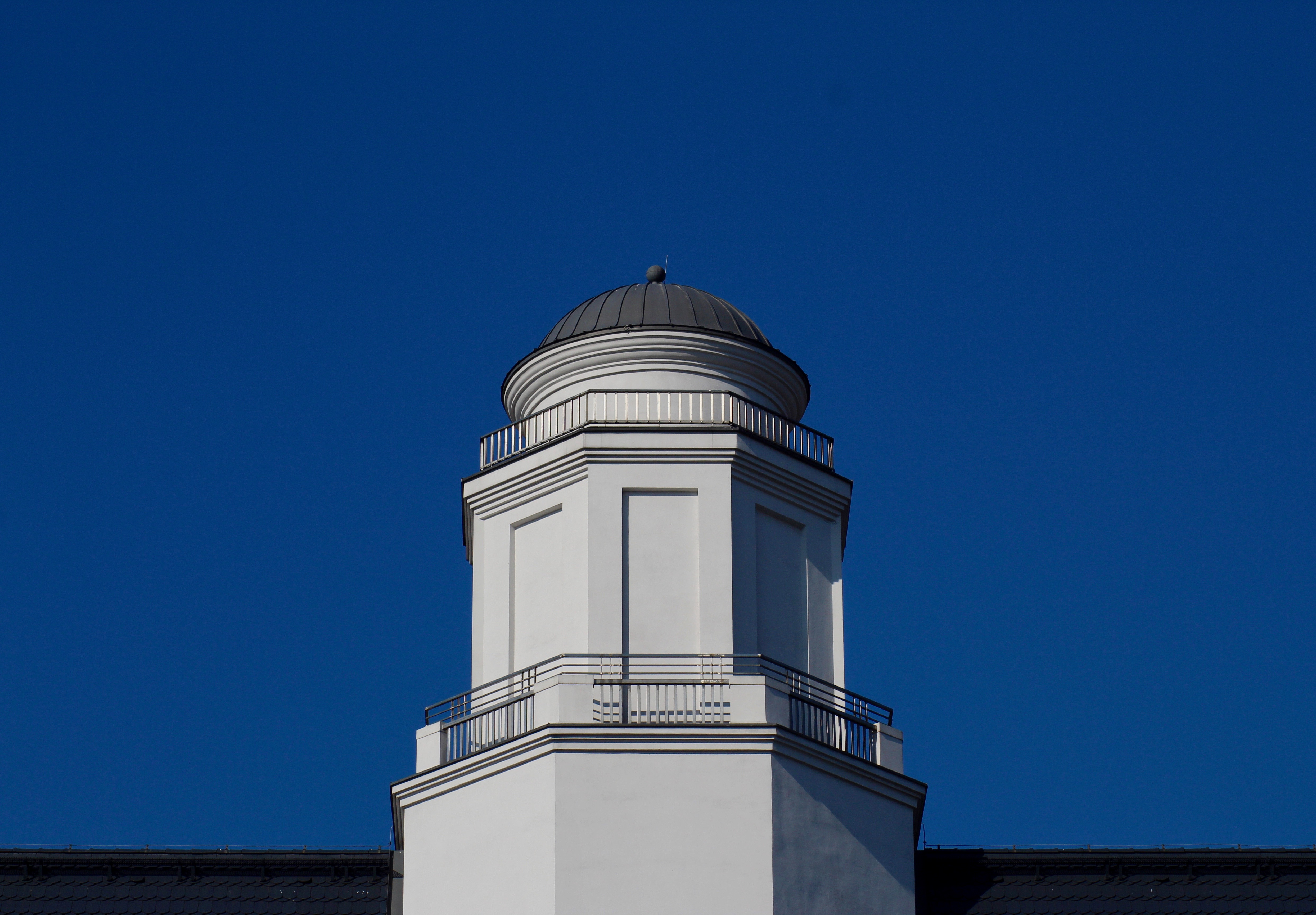 Dawny ratusz Gminy Bogucice